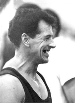 Nik Stuart